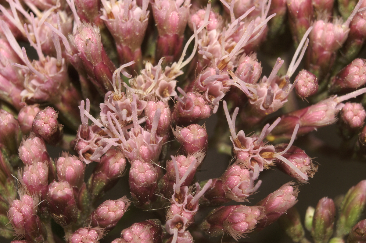 Konjska griva v Selu nad Polhovim Gradcem.